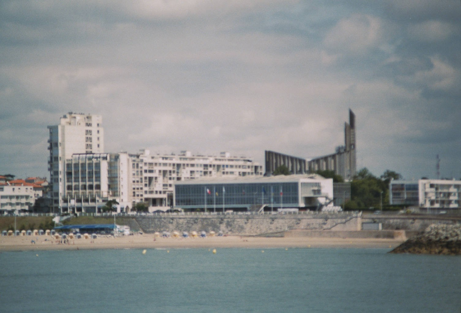 Beschreibung: Royan (Charente-Maritime) Fotograf: presse03, selbst fotografiert, Sommer 2003 Lizenz: GNU-FDL